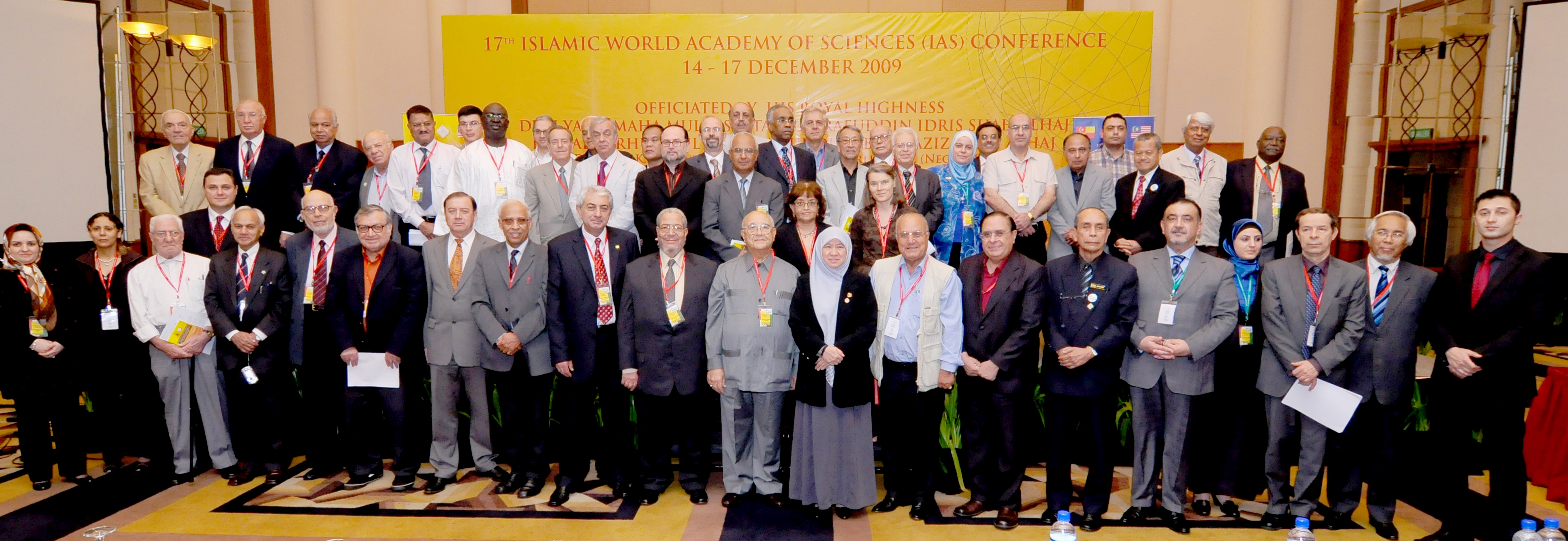 مؤتمر سيلانغور